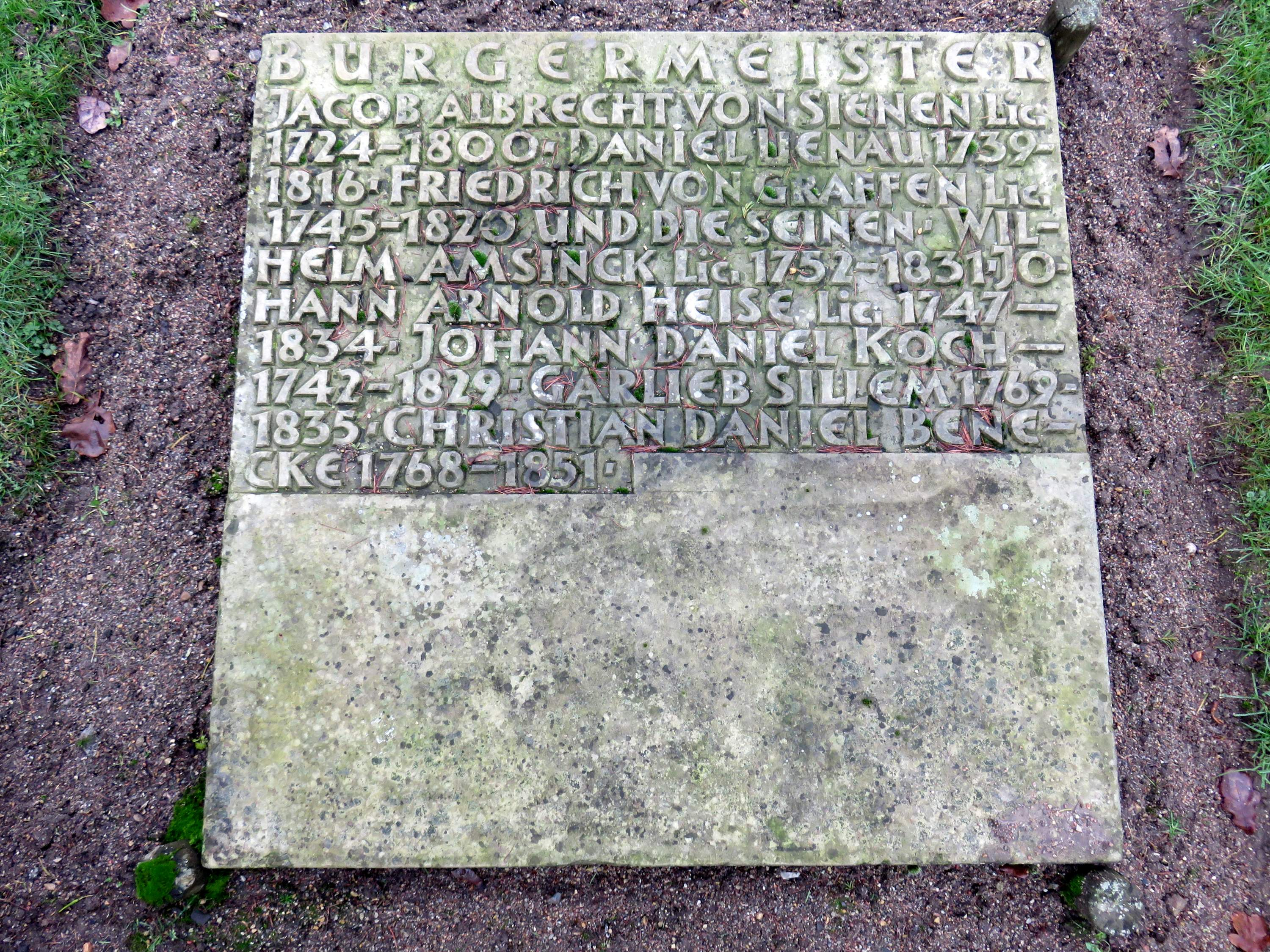 (II.) Sammelgrabmal Bürgermeister im Bereich des Althamburgischen Gedächtnisfriedhofs auf dem Hamburger Friedhof Ohlsdorf zu Ehren von u. a. Daniel Lienau, Wilhelm Amsinck, Johann Arnold Heise, Christian Daniel Benecke.